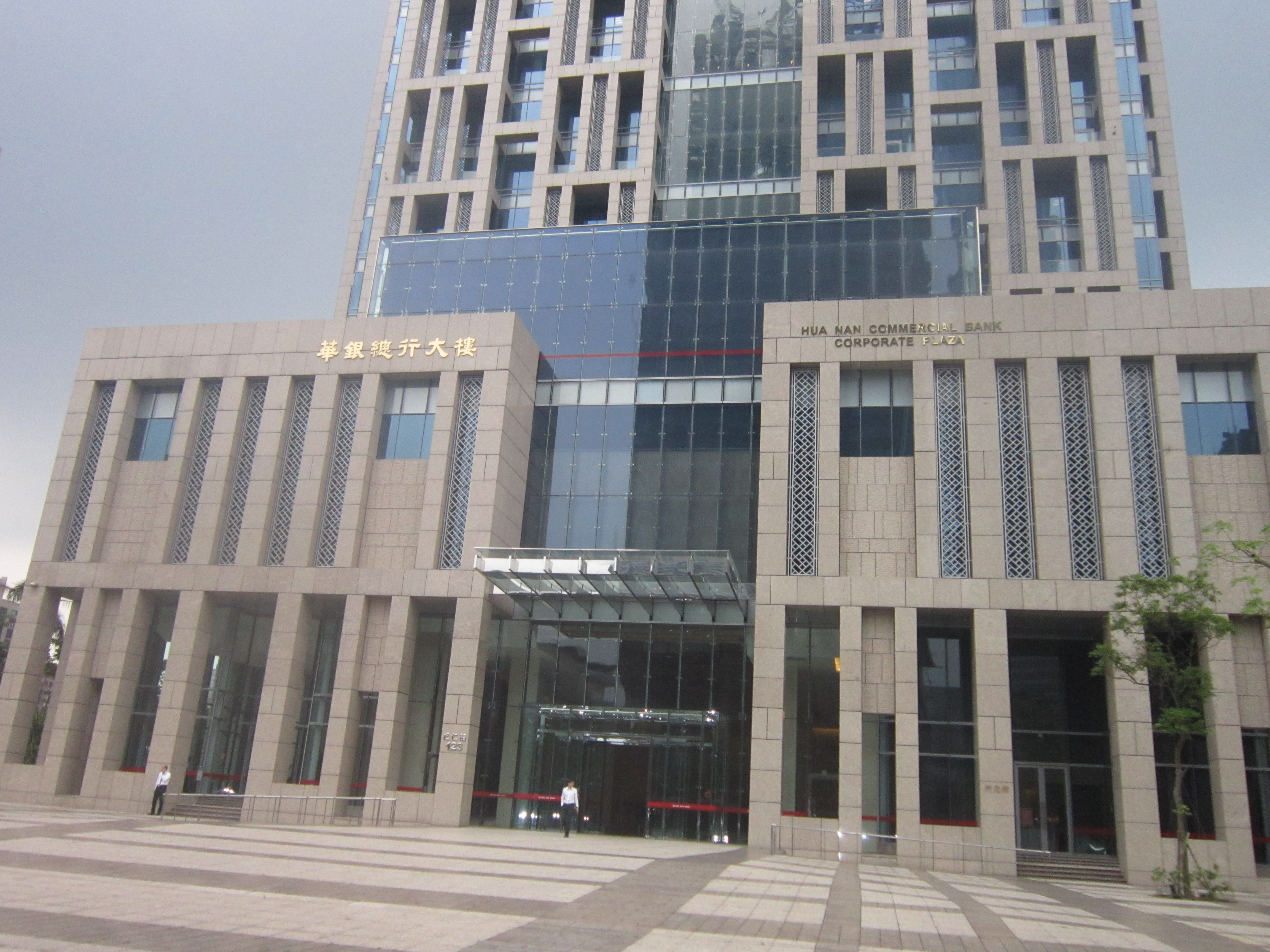 華南銀行總行大樓（臺北市信義區松仁路123號）廣場與一樓門面。